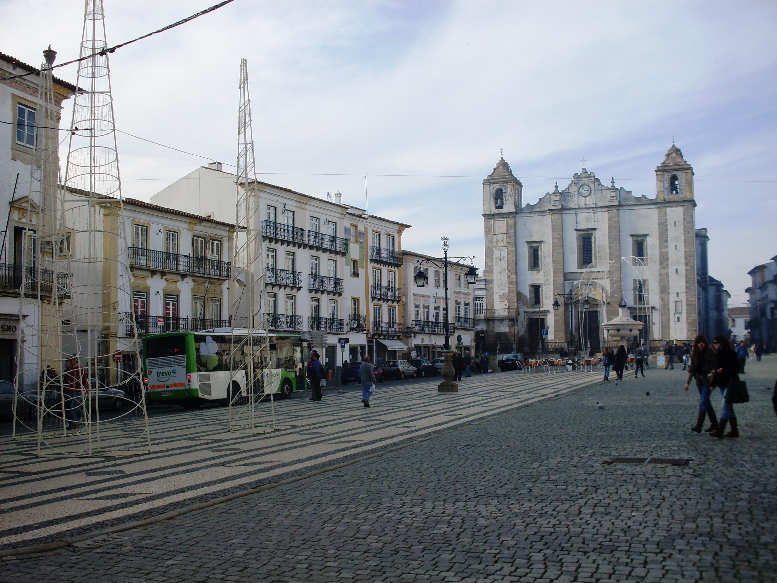 Praça do Giraldo, Évora.